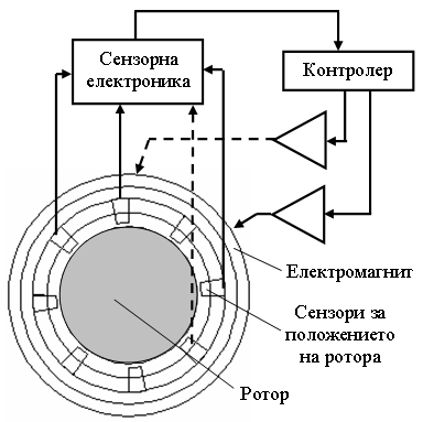 Принципна схема поясняваща управлението на магнитен лагер. © 2007 Милко Куйлеков